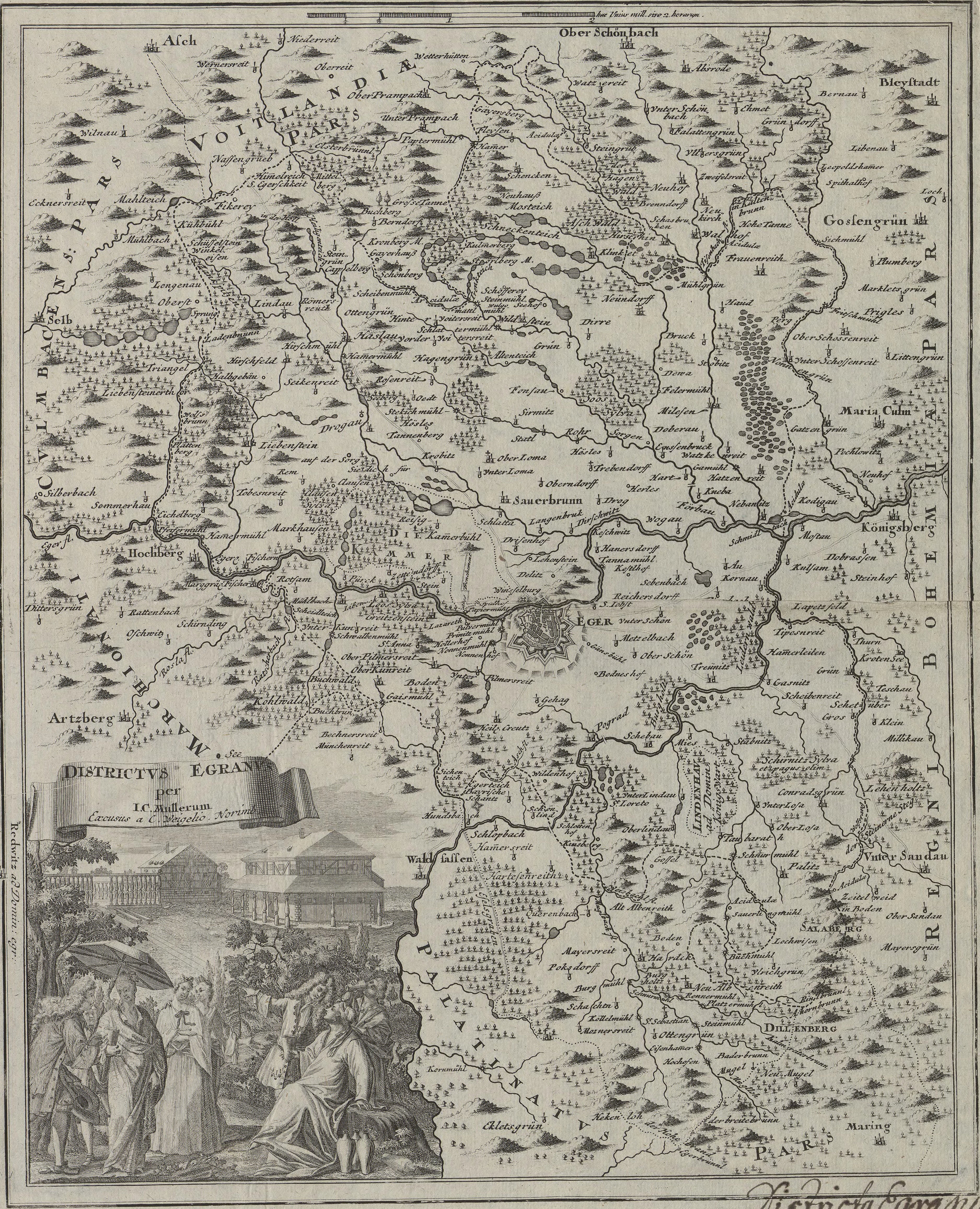 Karte des Egerlandes, 1945 zur Tschechoslowakei, 1993 zu Tschechien auch veröffentlicht als Kartenbeilage von: Heribert Sturm: Districtus Egranus, Eine ursprünglich Bayerische Region, in: Historischer Atlas von Bayern, München 1981, ISBN 3 7697 9930 0 Invalid ISBN (Erläuterungen zur Karte S. 324)